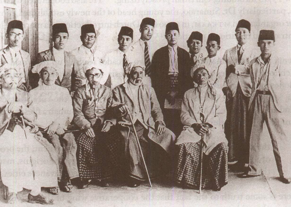 Duduk dari kanan: Syekh Daud Rasyidi, Syekh Mohd. Djamil Djambek, Syekh Sulaiman Ar Rasuli (Inyiak Canduang), Syekh Ibrahim Musa (Inyiak Parabek), Syekh DR. Abdullah Ahmad